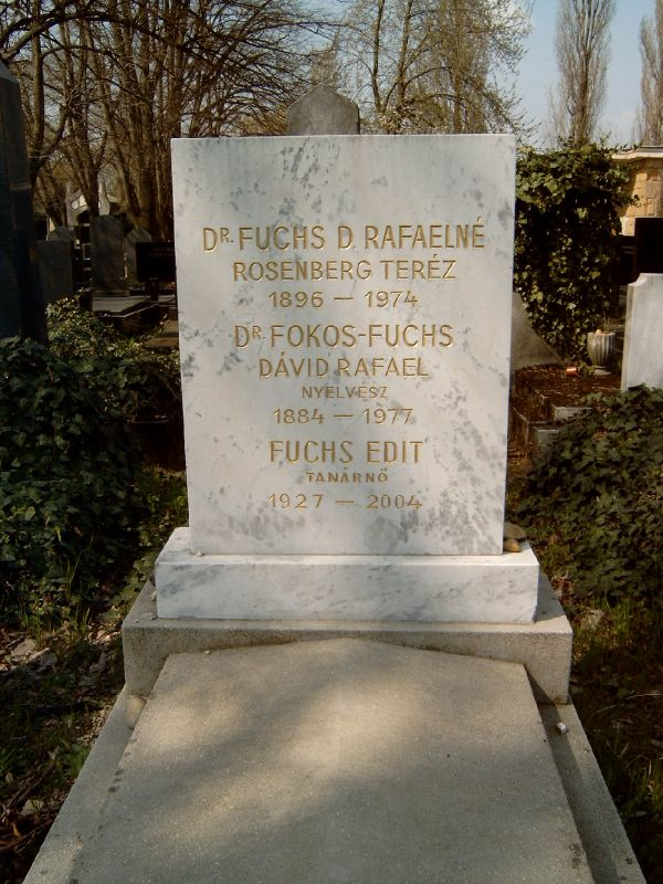 Fokos-Fuchs Dávid Rafael (Bizens, 1884. december 10. – Budapest, 1977. július 11.) nyelvész, etnográfus sírja Budapesten. Kozma utcai izraelita temető: 5B-9-5